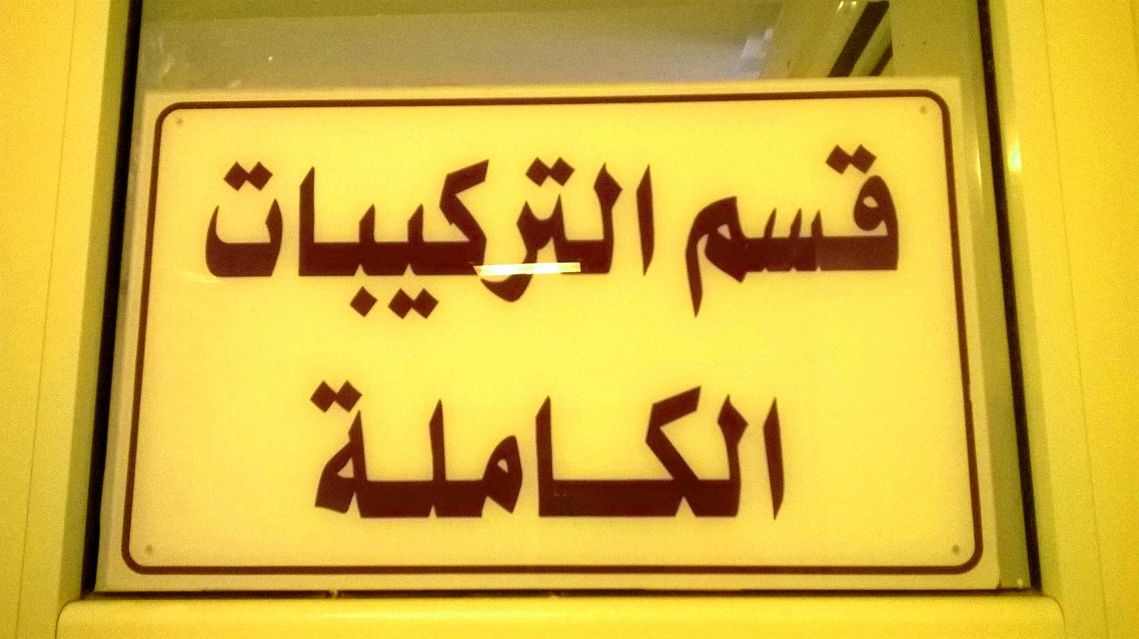 Clinique de médecine dentaire de Monastir, Monastir, Tunisie المصحة الاستشفائية الجامعية لطب الأسنان بالمنستير, المنستير، تونس